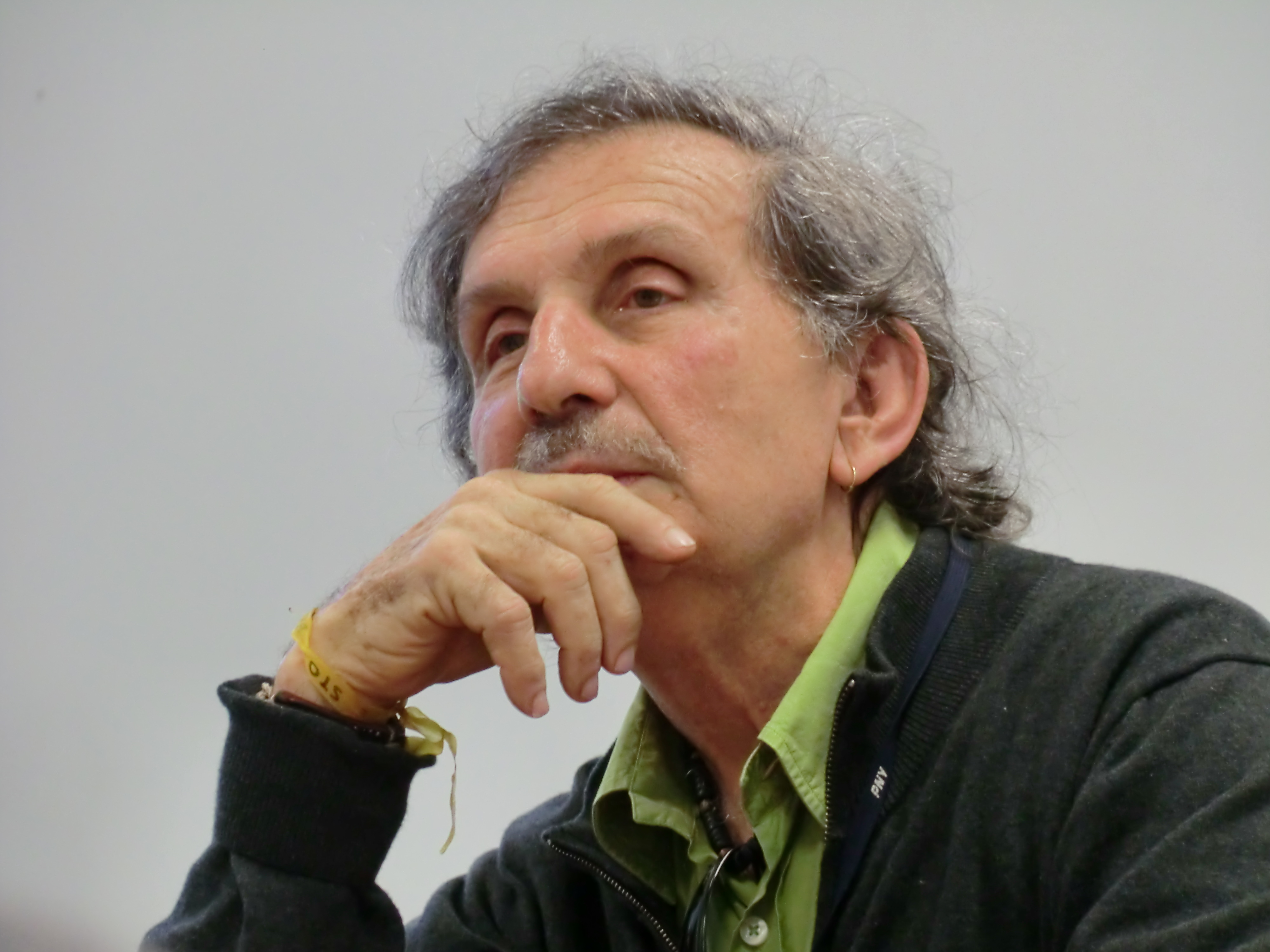 Venezuelan poet Luis Alberto Crespo, UCAB, 2011.